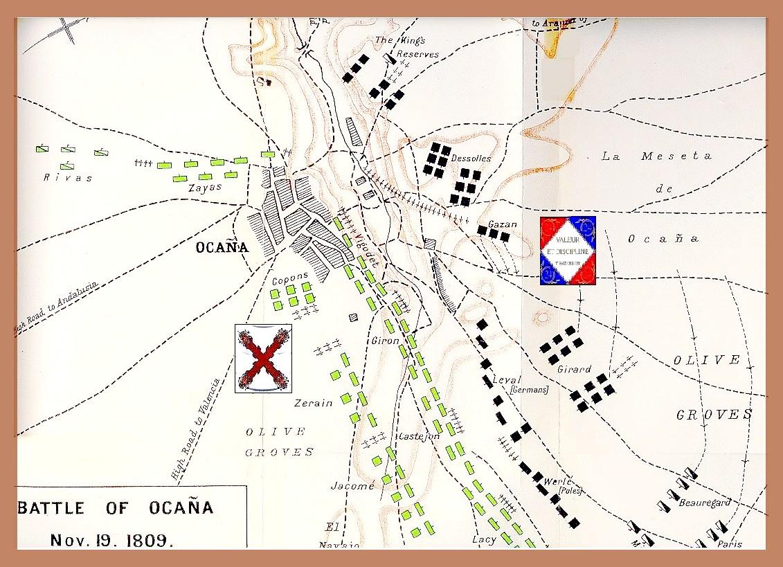 Plano de la Batalla de Ocaña. 19 de noviembre de 1809